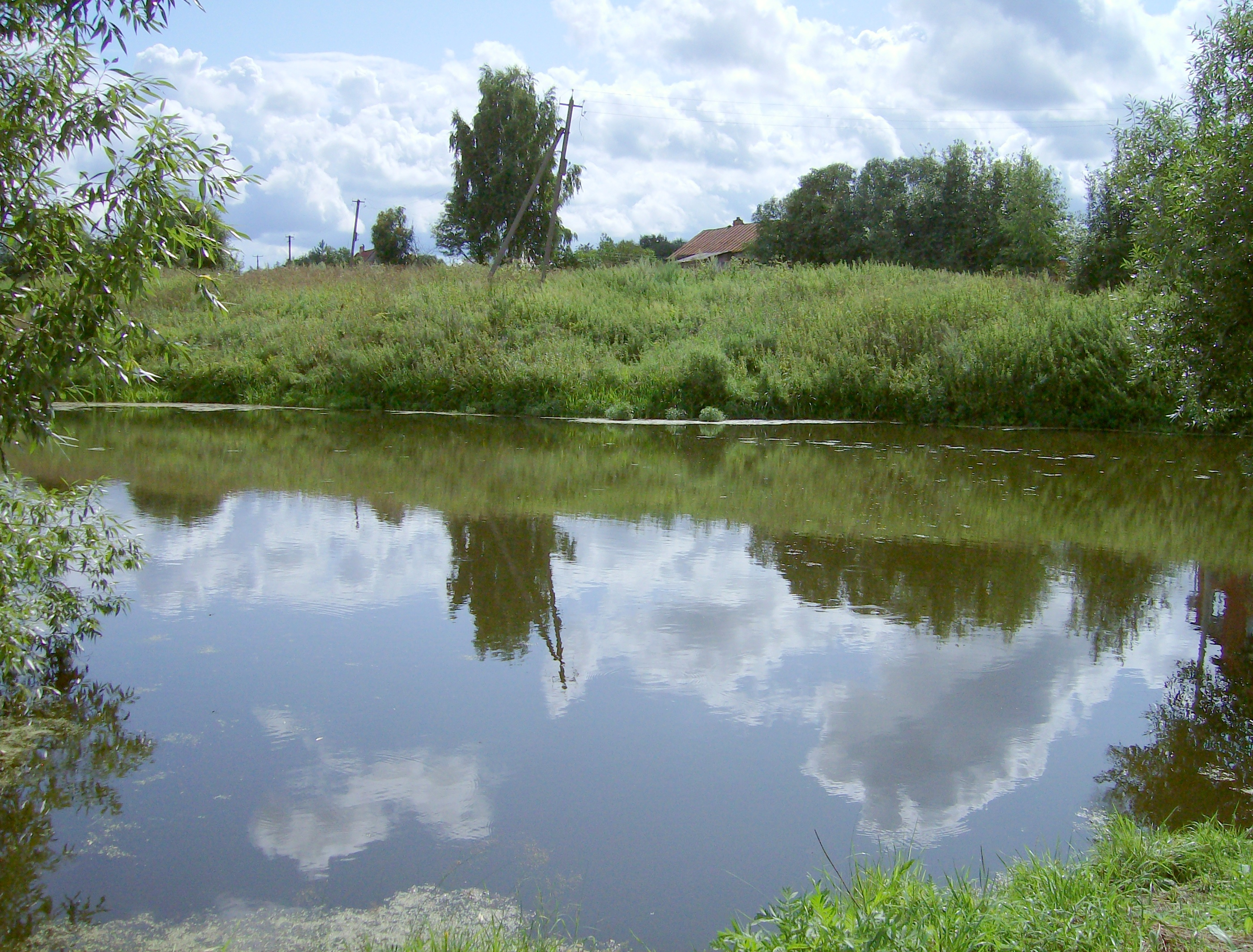 Деревня Буньково Ступинского района, 2009.